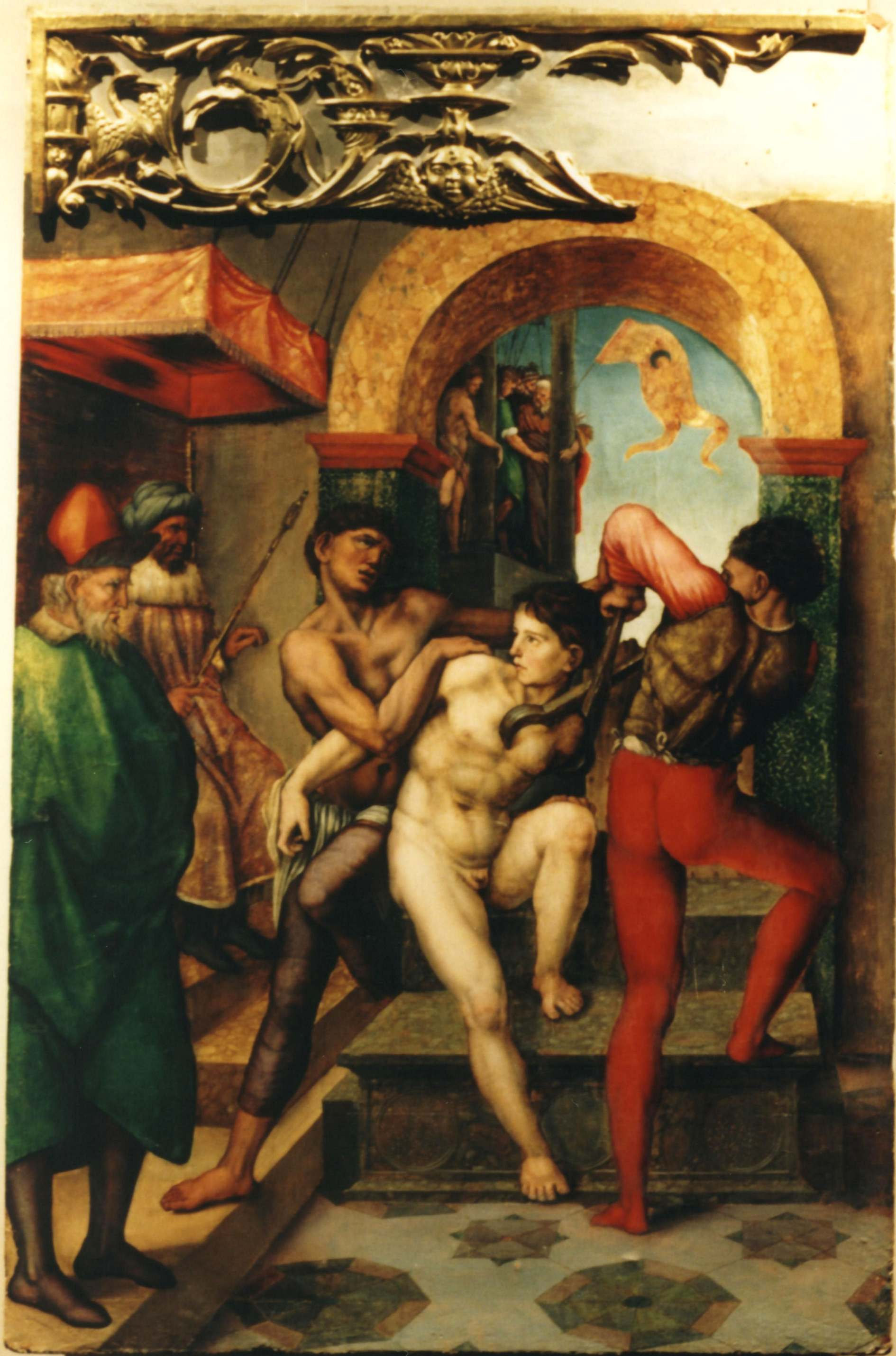 Martirio de San Pelayo, retablo mayor de la iglesia de San Pelayo de Olivares de Duero (Palencia).